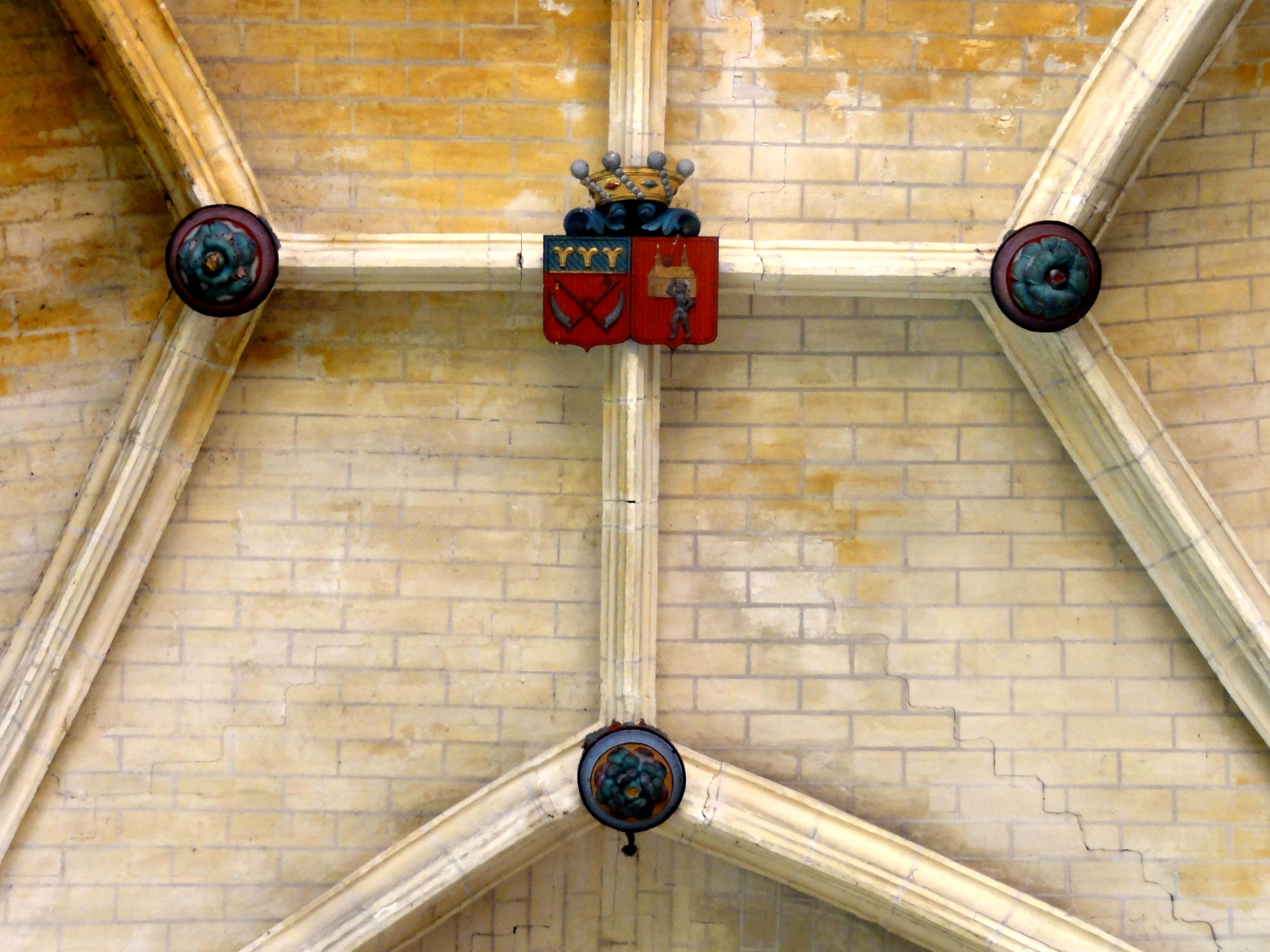 Voûte de la dernière travée du collatéral sud : quatre des cinq clés de voûte.